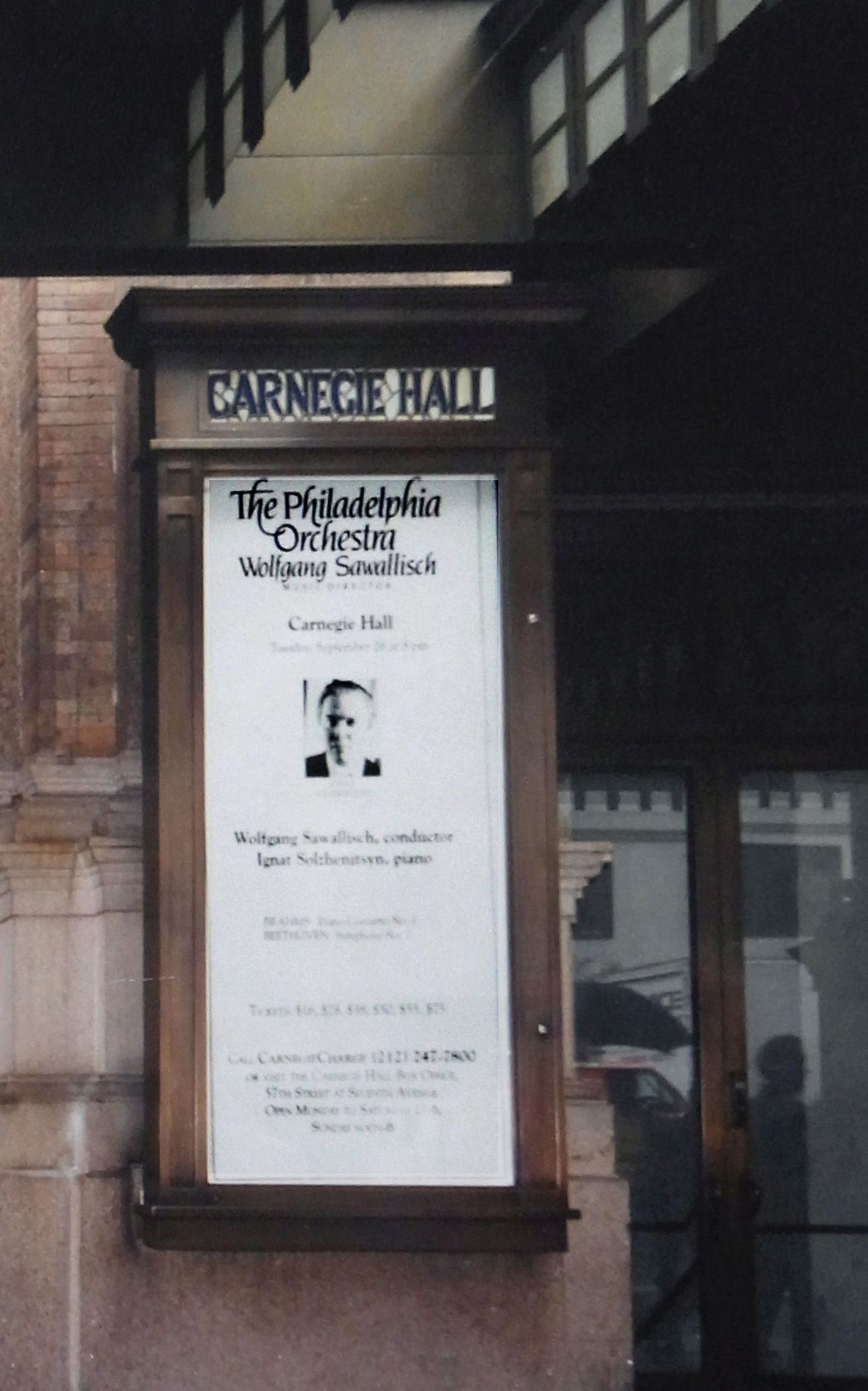 Carnegie-Hall - Konzertplakat vor der Carnegie-Hall - wg. Konzert am 26.9.1995 - Dir. W. Sawallisch - Solist Ignat Solzhenitsyn (1. Brahms-Klavier Konzert)